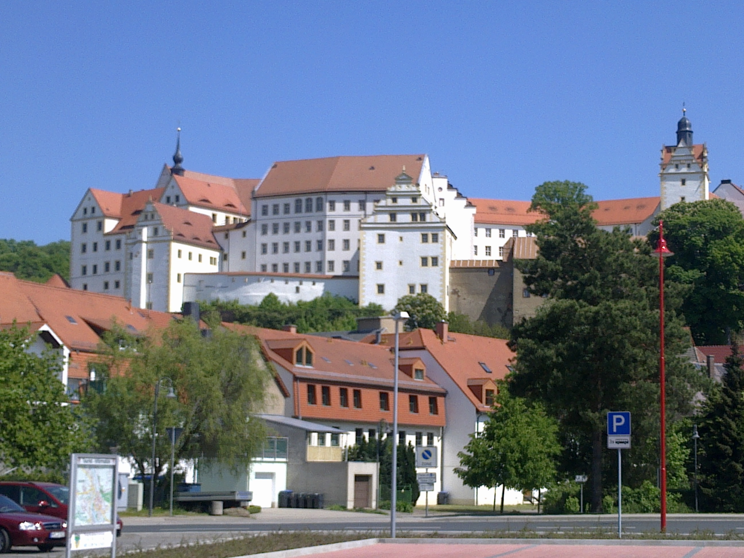 Colditz - Denkmalschutzgebiet Altstadtbereich Colditz (innerhalb der Stadtmauer)